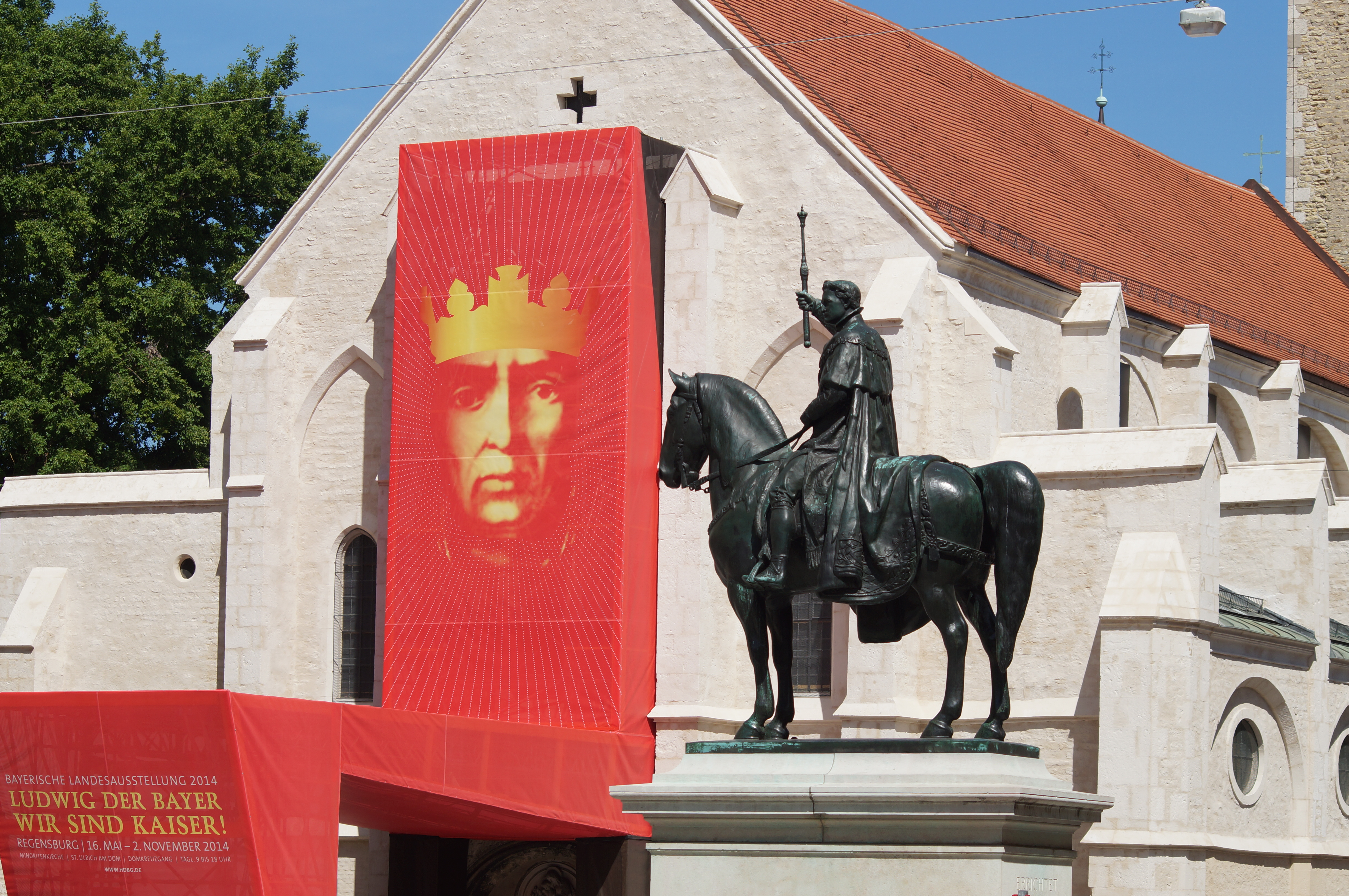 St. Ulrich in Regensburg als Ausstellungsort der Bayerischen Landesausstellung 2014 "Ludwig der Bayer" in Regensburg. Vorn im Bild die Reiterstatue Ludwigs I. von Bayern